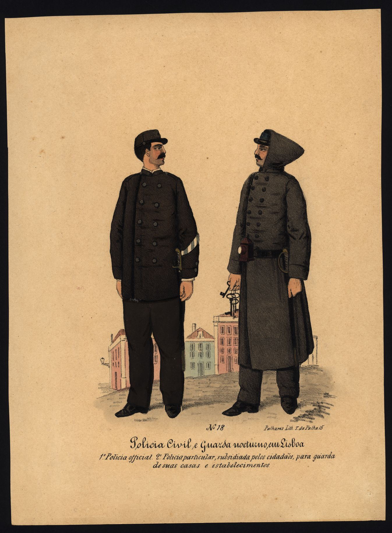 Policia civil e guarda nocturno, em Lisboa. 1º - Polícia oficial; 2º- Polícia particular, subsidiada pelos cidadãos, para guarda de suas casas e estabelecimentos.